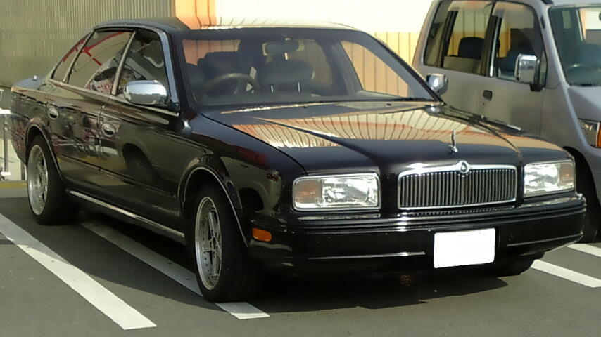 日産・プレジデント（2代目）